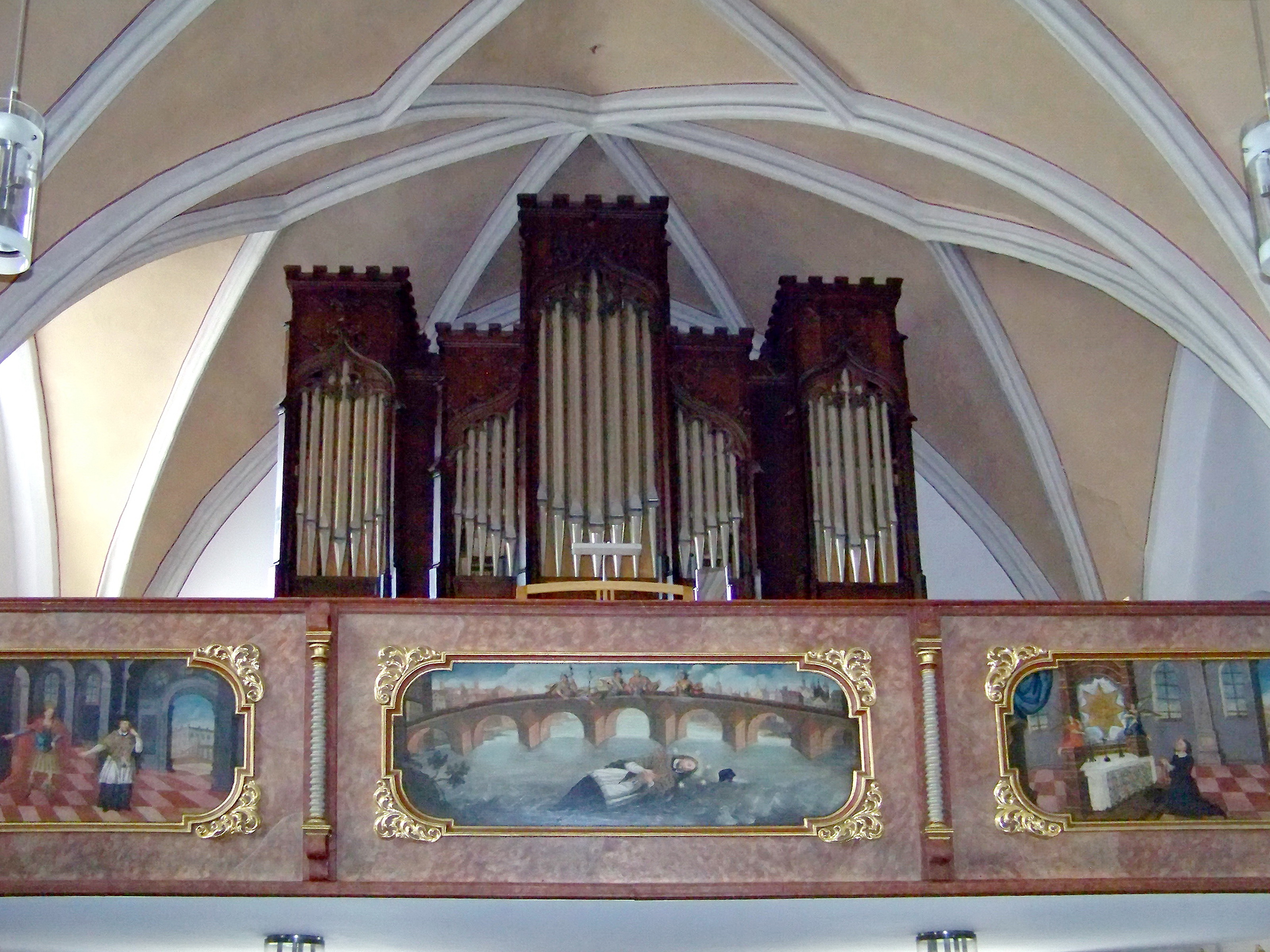 Kirchberg (Kröning) Pfarrer-Spirkner-Straße 5. Katholische Pfarrkirche St. Florian und St. Wolfgang. Saalbau mit eingezogenem Chor und angebauten Seitenschiffen. Anlage aus der zweiten Hälfte des 15. Jahrhunderts, mit freistehendem Sattelturm, spätromanisch, wohl noch 12. Jahrhundert. Westempore mit Orgel.